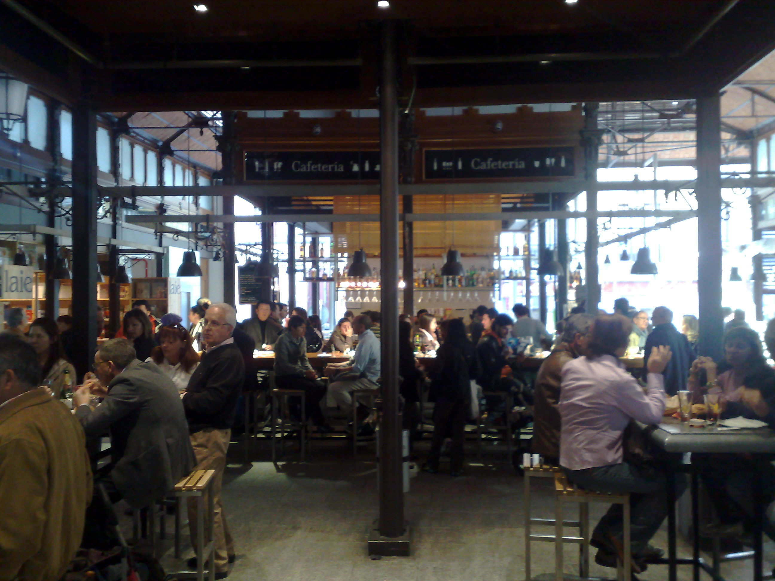 Madrid. Mercado de San Miguel, vista general de su interior